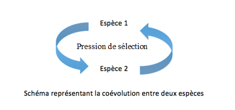 Espèces 1 et 2 interagissent réciproquement